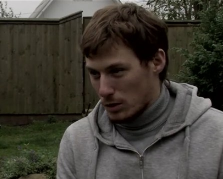 інтэрвью з рэжысёрам А.Лобачам